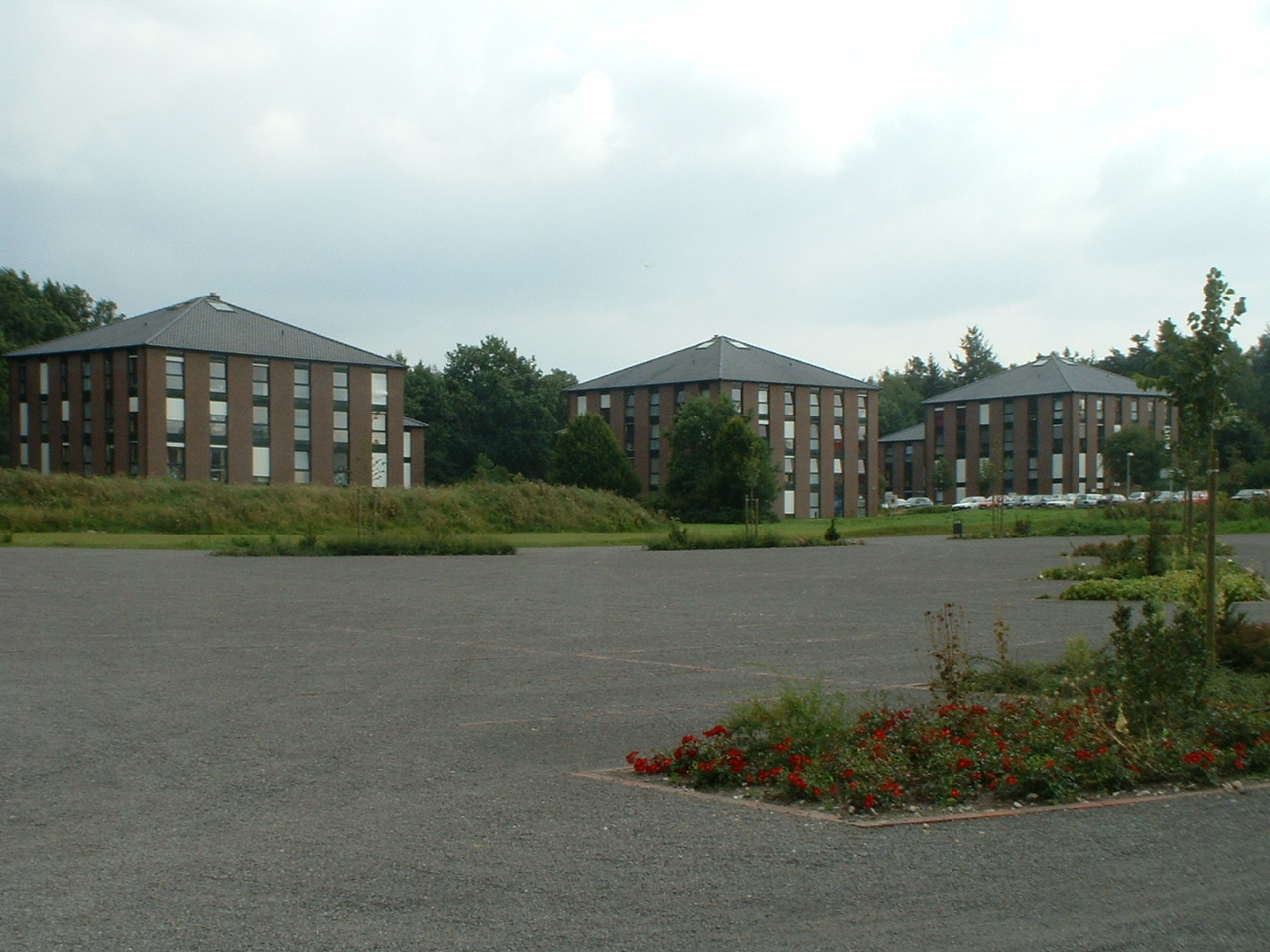 Hochschule Vechta, Niedersachsen: Studentenwohnpark Source: self-made photo Photograph: P_A Date: Summer 2007 Licence: GNU FDL